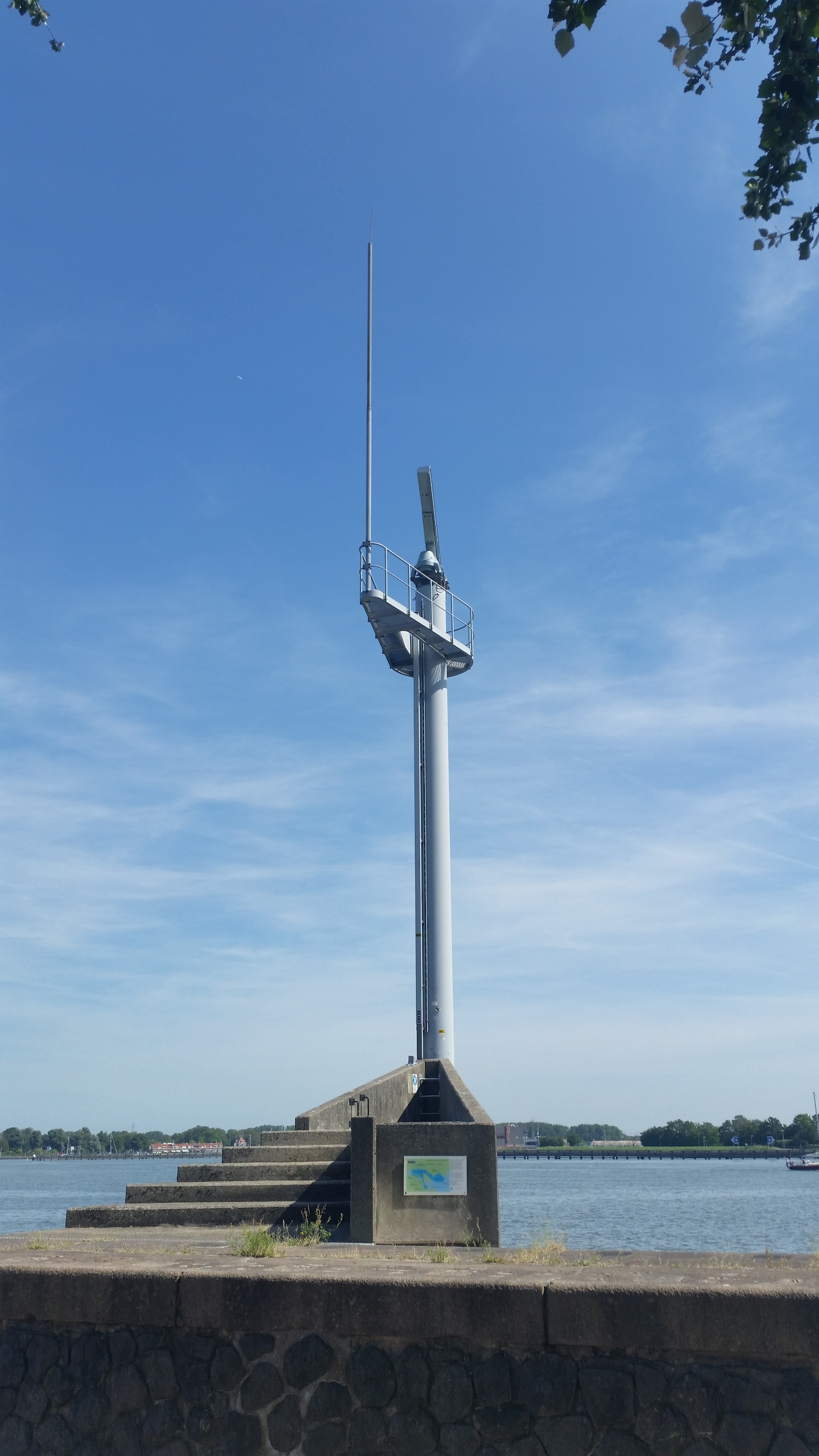 Radarpost Surinamekade